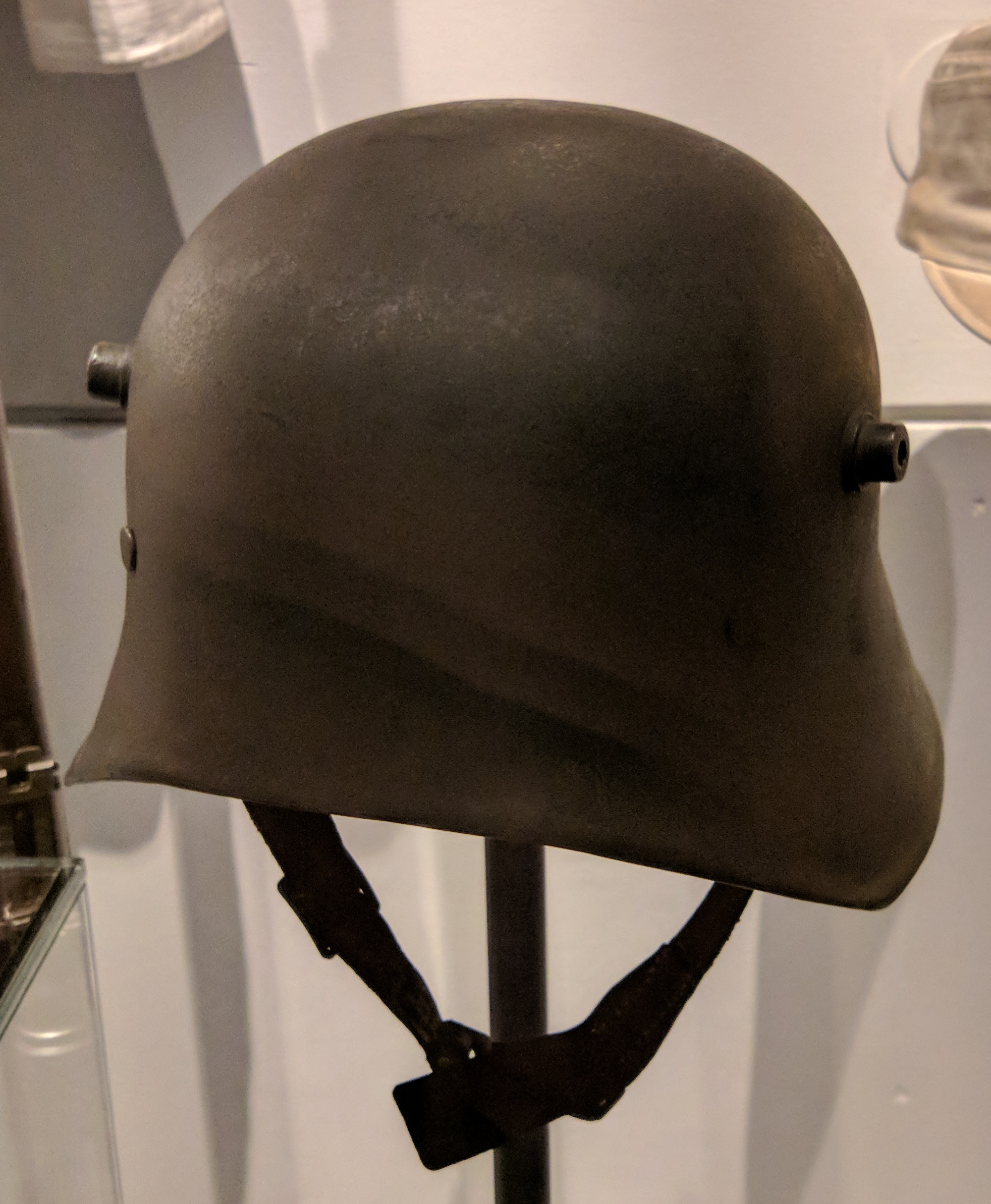 Turški model čelade Stahlhelm.